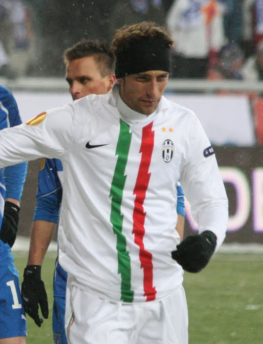 Claudio Marchisio difende il primo palo su un calcio d'angolo, Lech Poznań vs Juventus, UEFA Europa League, 1º dicembre 2010.